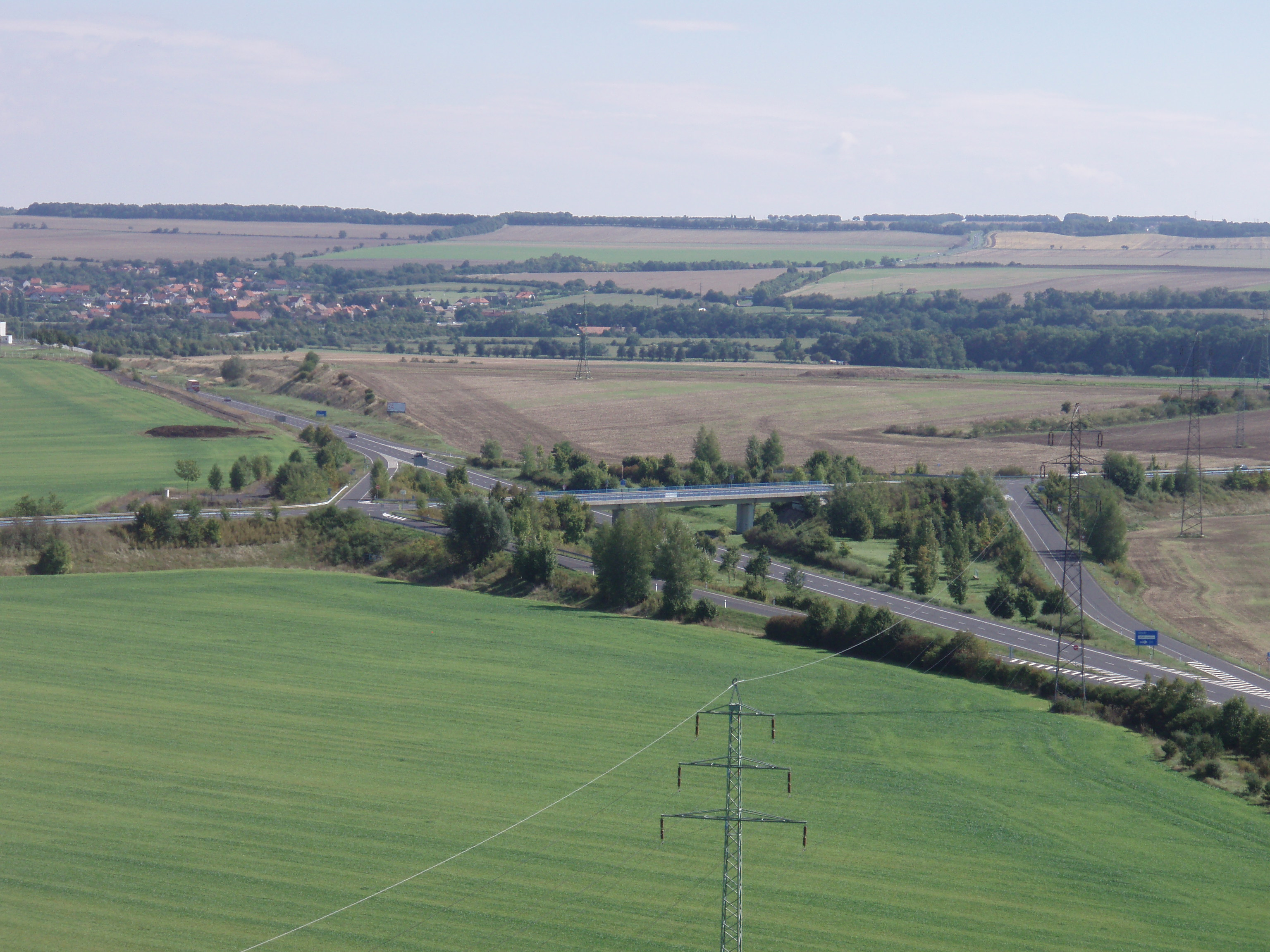 Pohled z vodárenské věže na jihovýchod. Uprostřed snímku je křížení silnic II/229 a I/7 na lounském obchvatu. Vsí na snímku jsou Chlumčany. Vpravo se ztrácí na horizontu silnice I/7.